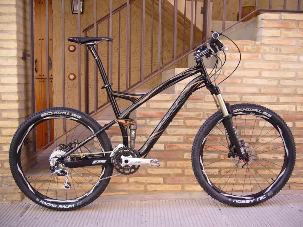 Specialized Stumpjumper 2008. Foto tomada en Tuéjar, el día que terminé de montarla.